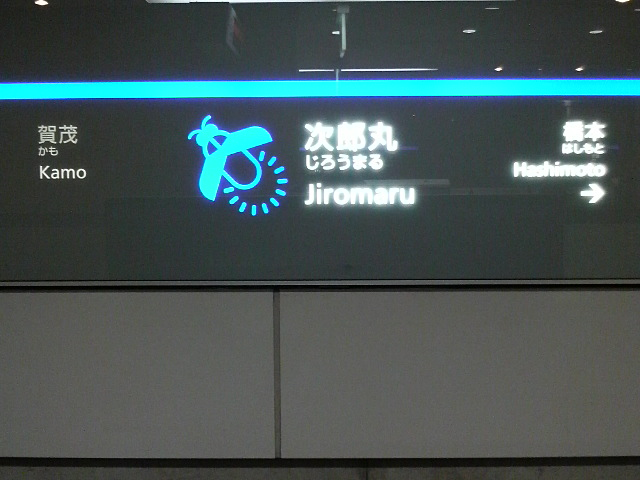 福岡市地下鉄七隈線次郎丸駅の駅名標